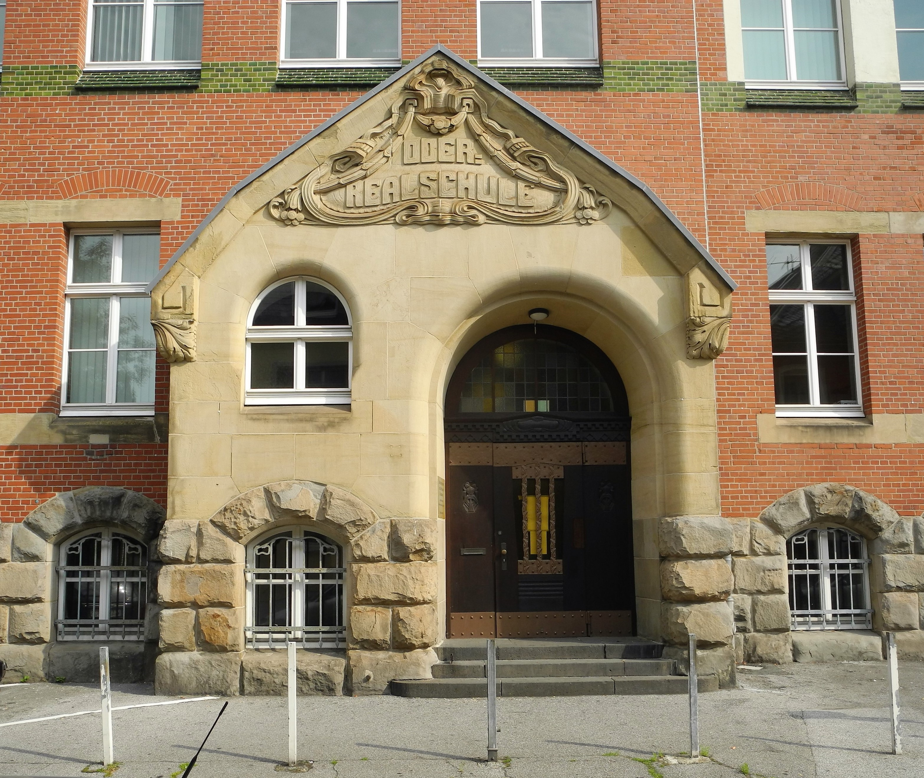 Wuppertal, Wohnquartier Oberbarmen-Schwarzbach, Berufskolleg Barmen, Zweigstelle Diesterwegstr. 3, Erweiterungsbau, Hauptportal; in der Kartusche im dessen Giebel die Bezeichnung "OBERREALSCHULE", aus welcher wiederum sich das Carl-Duisberg-Gymnasium entwickelte.